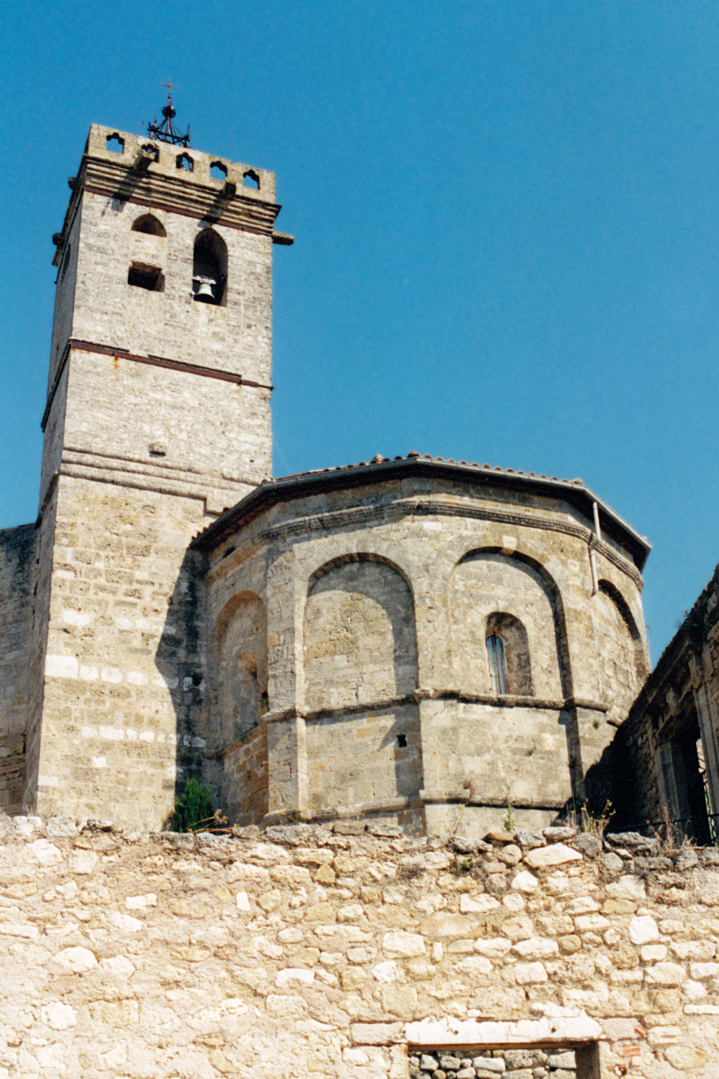 France - Languedoc - Hérault - Église de Saint-Pons-de-Mauchiens